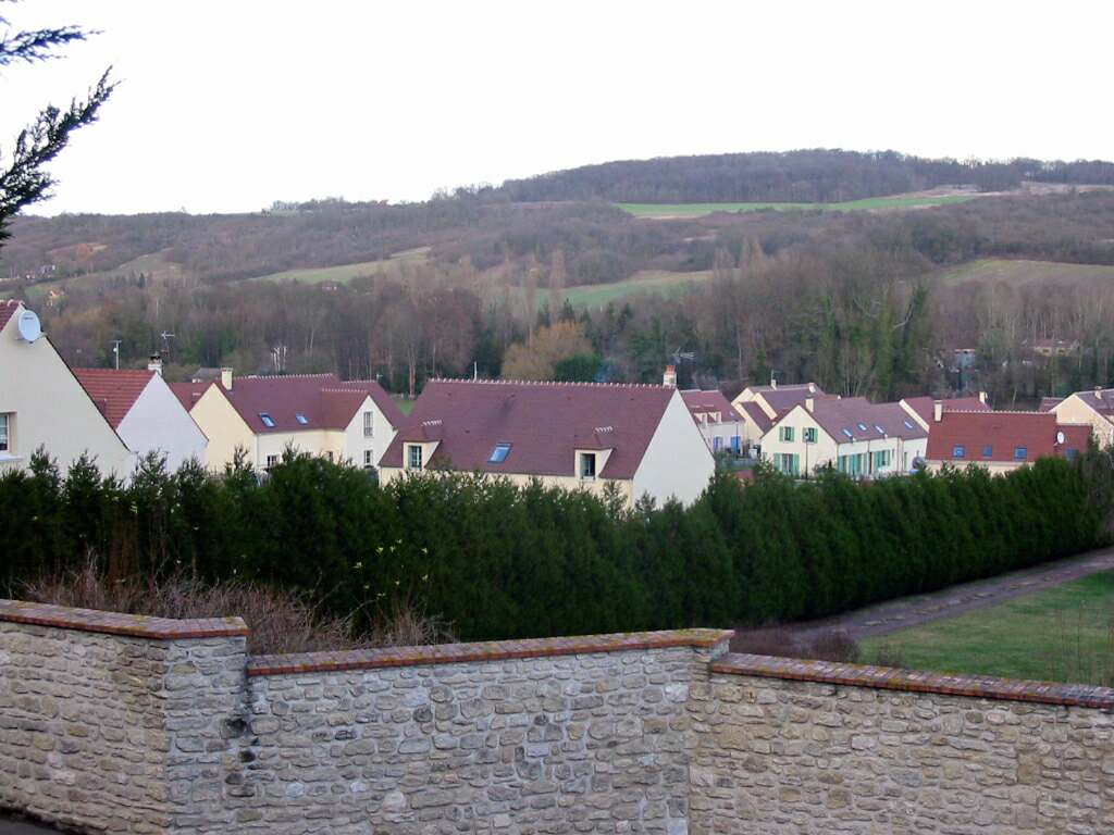 Lotissement de la Tourelle à Maule Photo JH Mora ; Janvier 2005